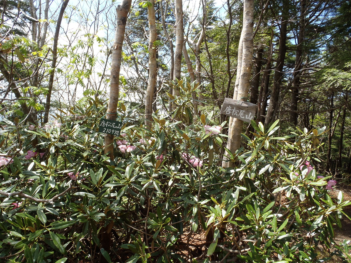 唐松尾山 2012-06-14